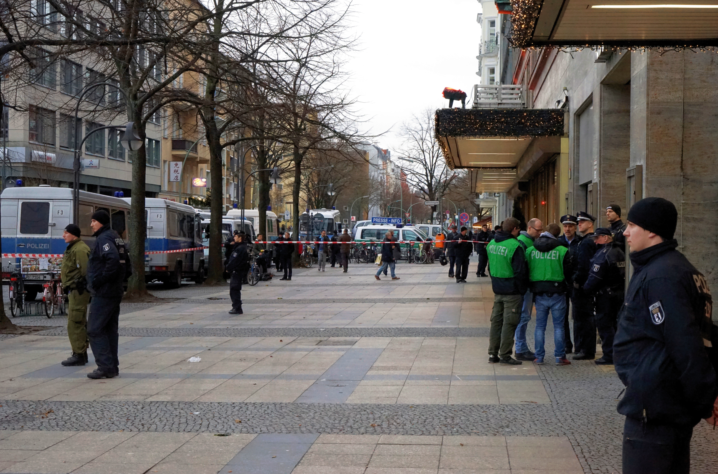 Aufnahme